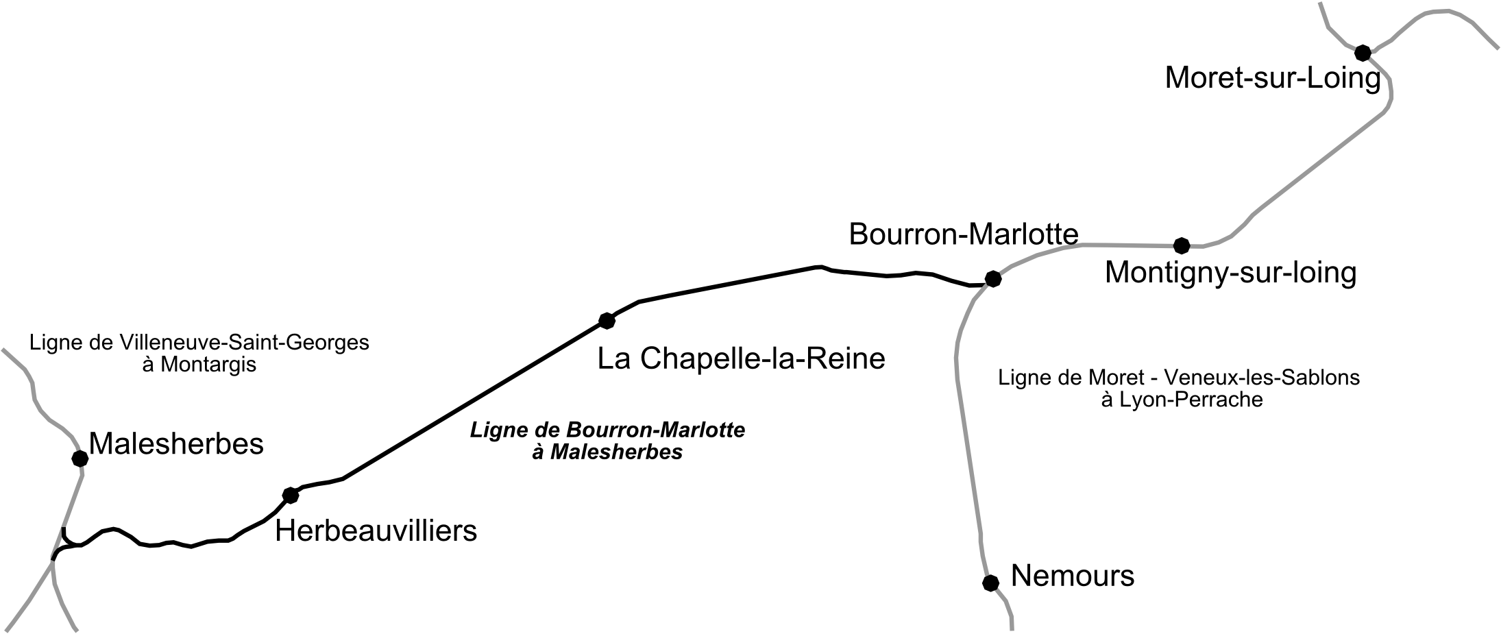 Tracé de la ligne de Bourron-Marlotte à Malesherbes